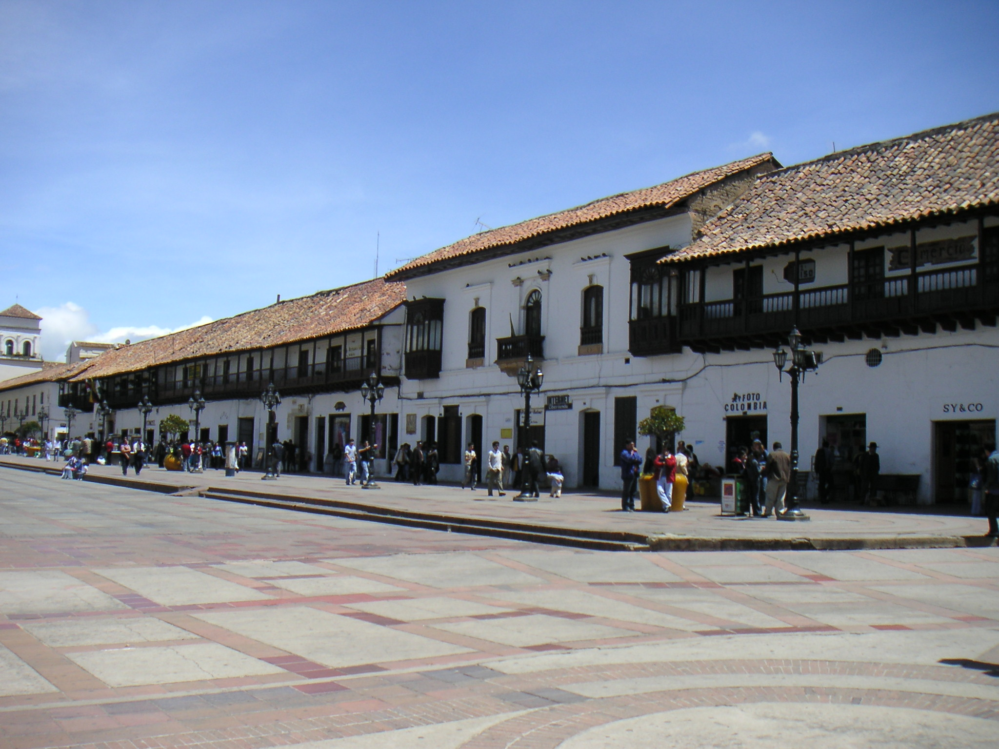 Description: Plaza Central de Tunja, Colombia Source: Louise Wolff (darina), June 2005